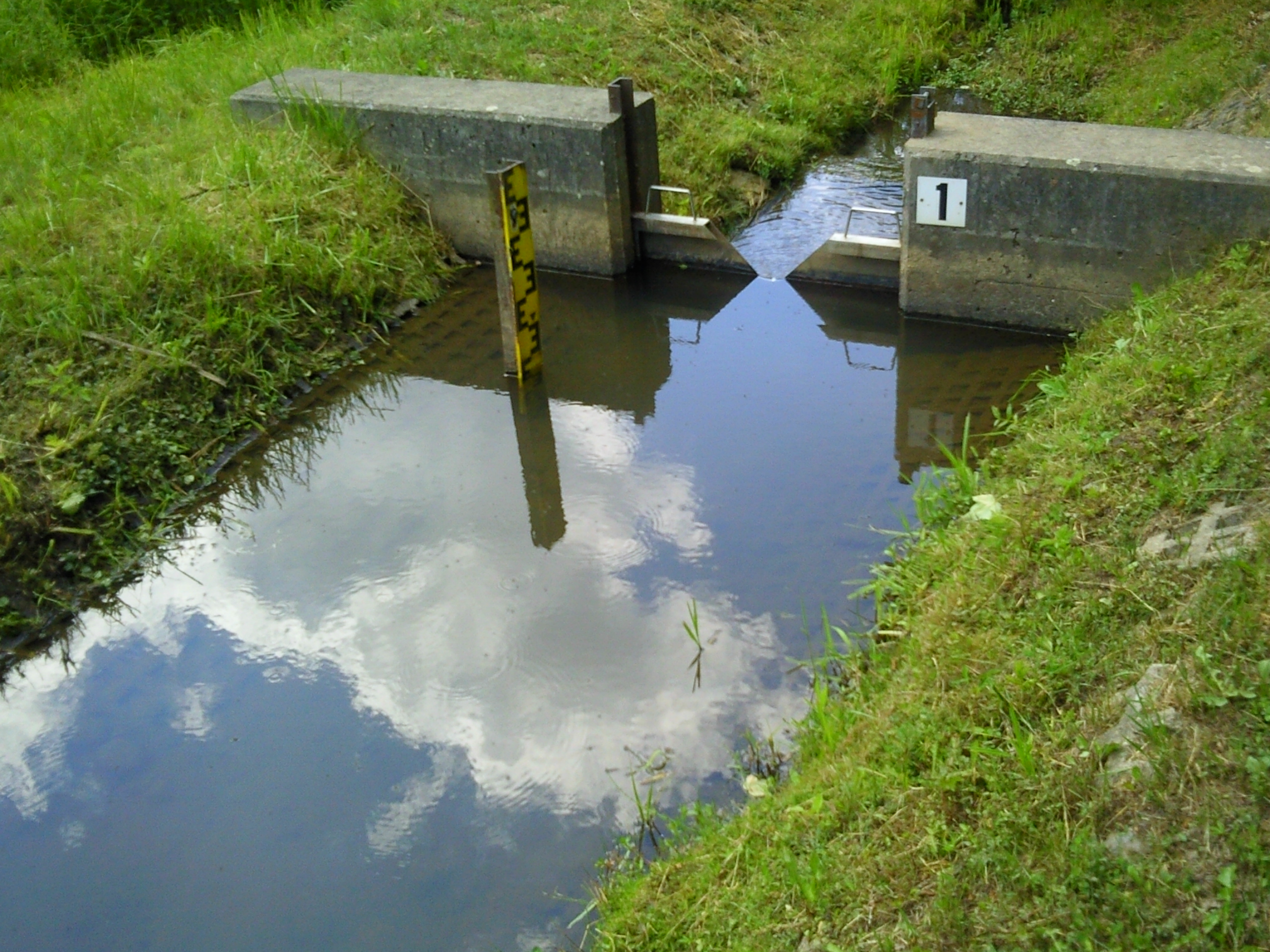 Stauwehr am Teufelsgrundbach